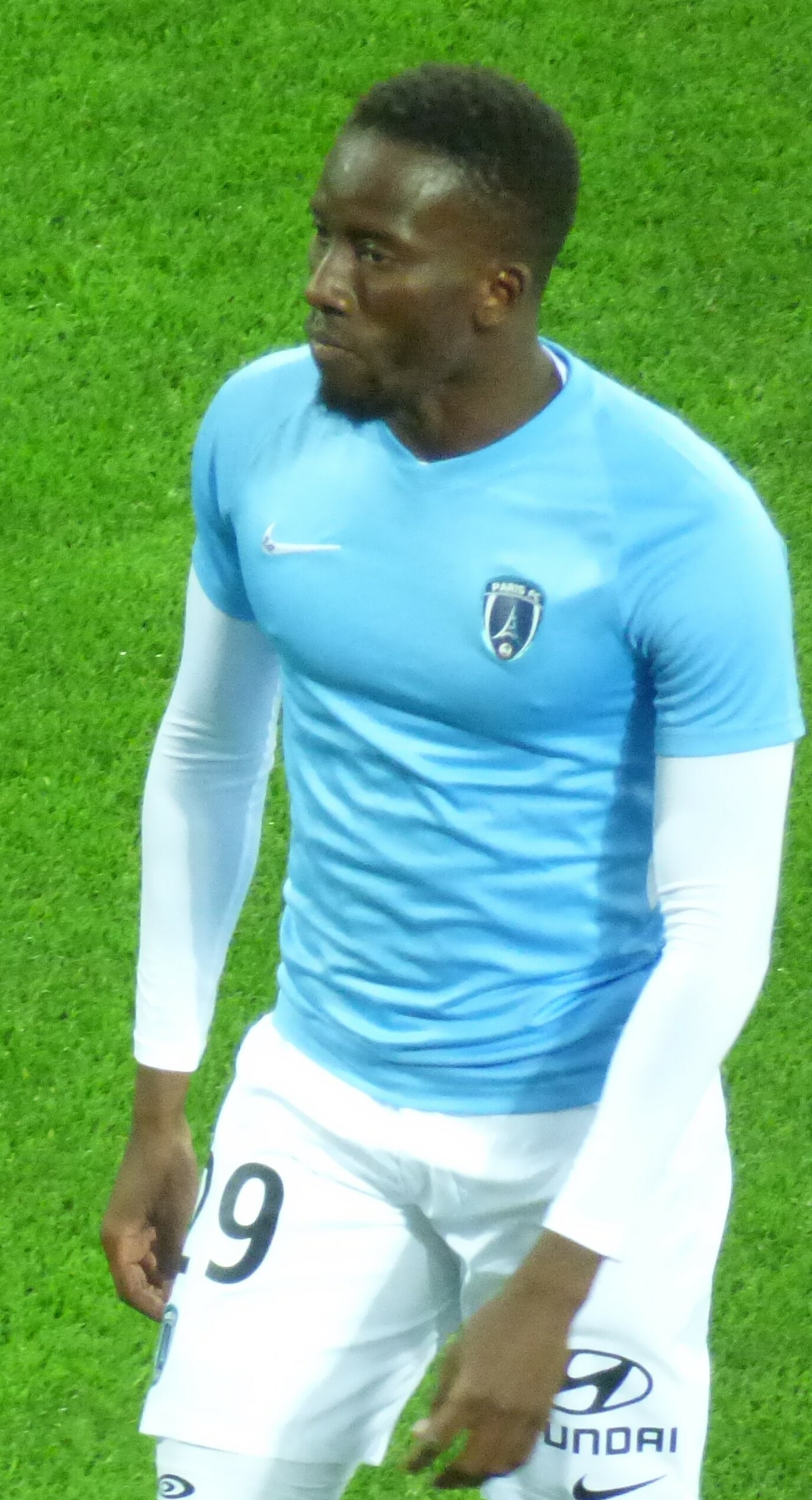 Adama Sarr avant le match Lens / Paris, comptant pour la neuvième journée du championnat de France de football de Ligue 2, le 28 septembre 2018.